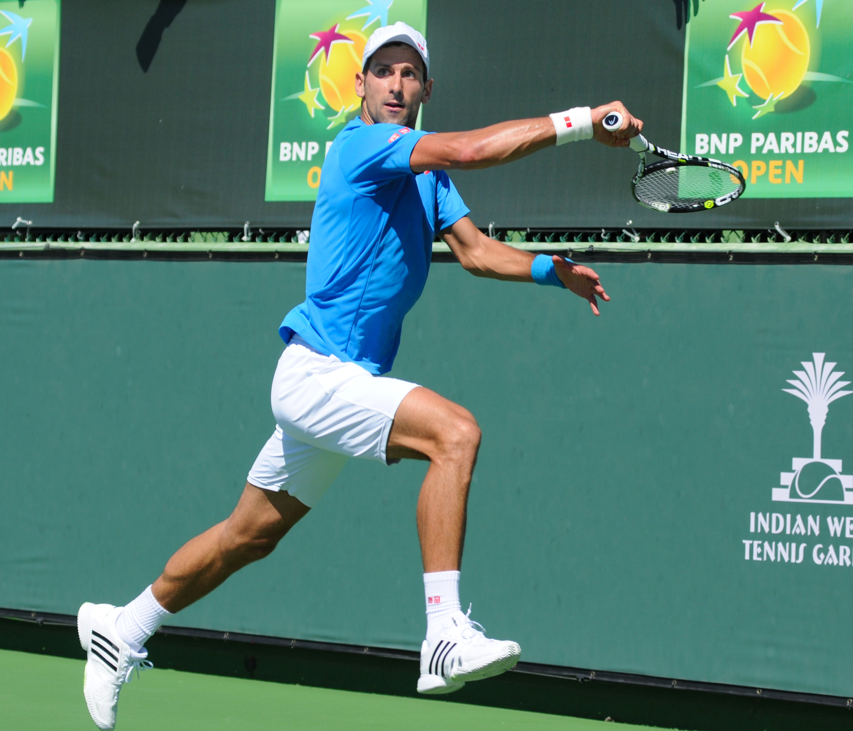 2015 BNP Paribas Open